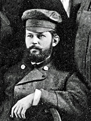 Emil Fischer (* 9. Oktober 1852 in Euskirchen; † 15. Juli 1919 in Berlin), LMU München